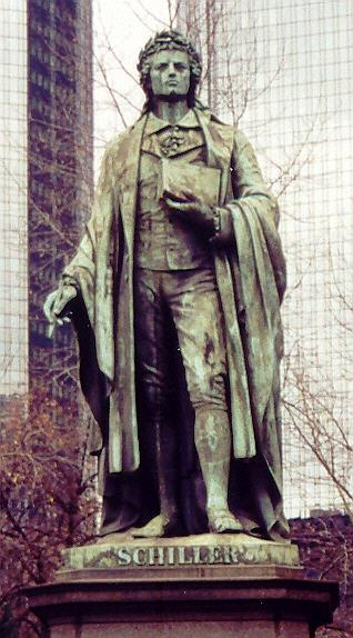 Pomnik Schillera, Frankfurt nad Menem, fot. Andrzej Barabasz Attribution-ShareAlike 2.0